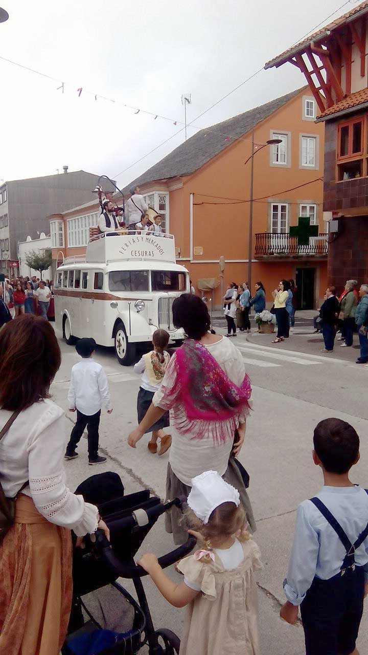 Festa Curtis na Lembranza en 2017.